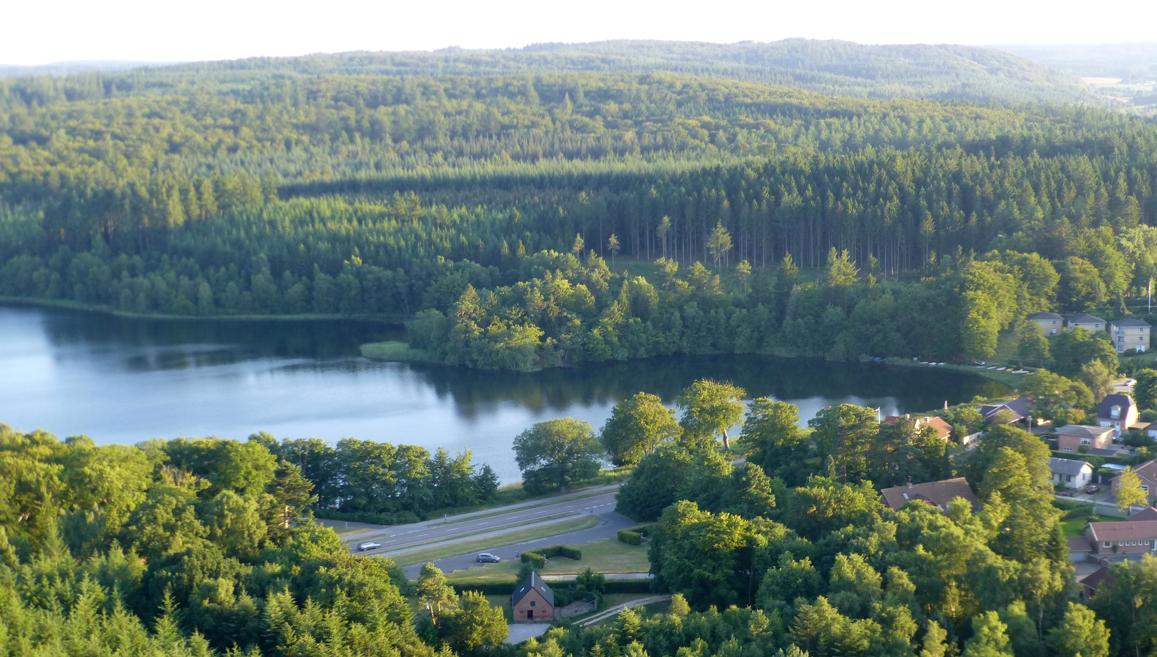 Silkeborg Vesterskov med Almindsø i forgrunden